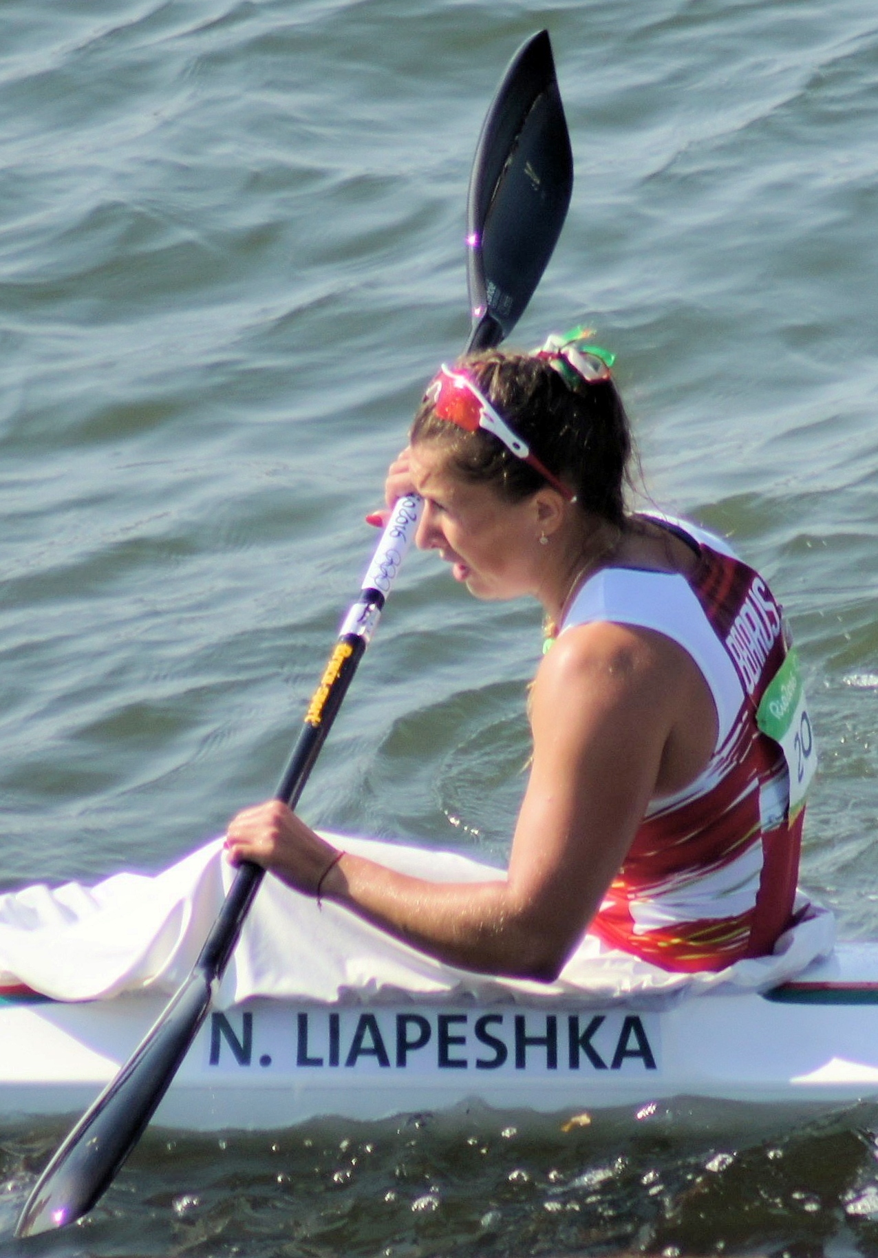 Rio 2016. Canoagem de velocidade/Canoe sprint